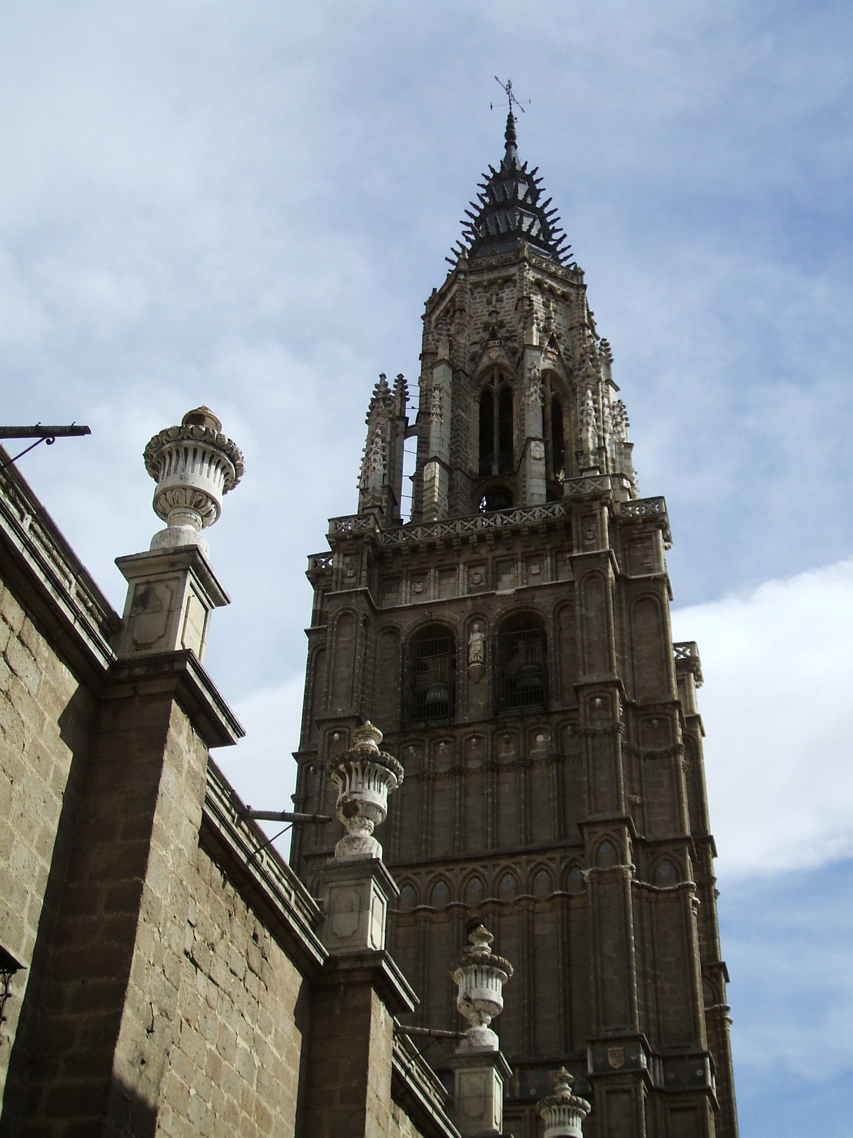 המגדל הצפוני הגותי.